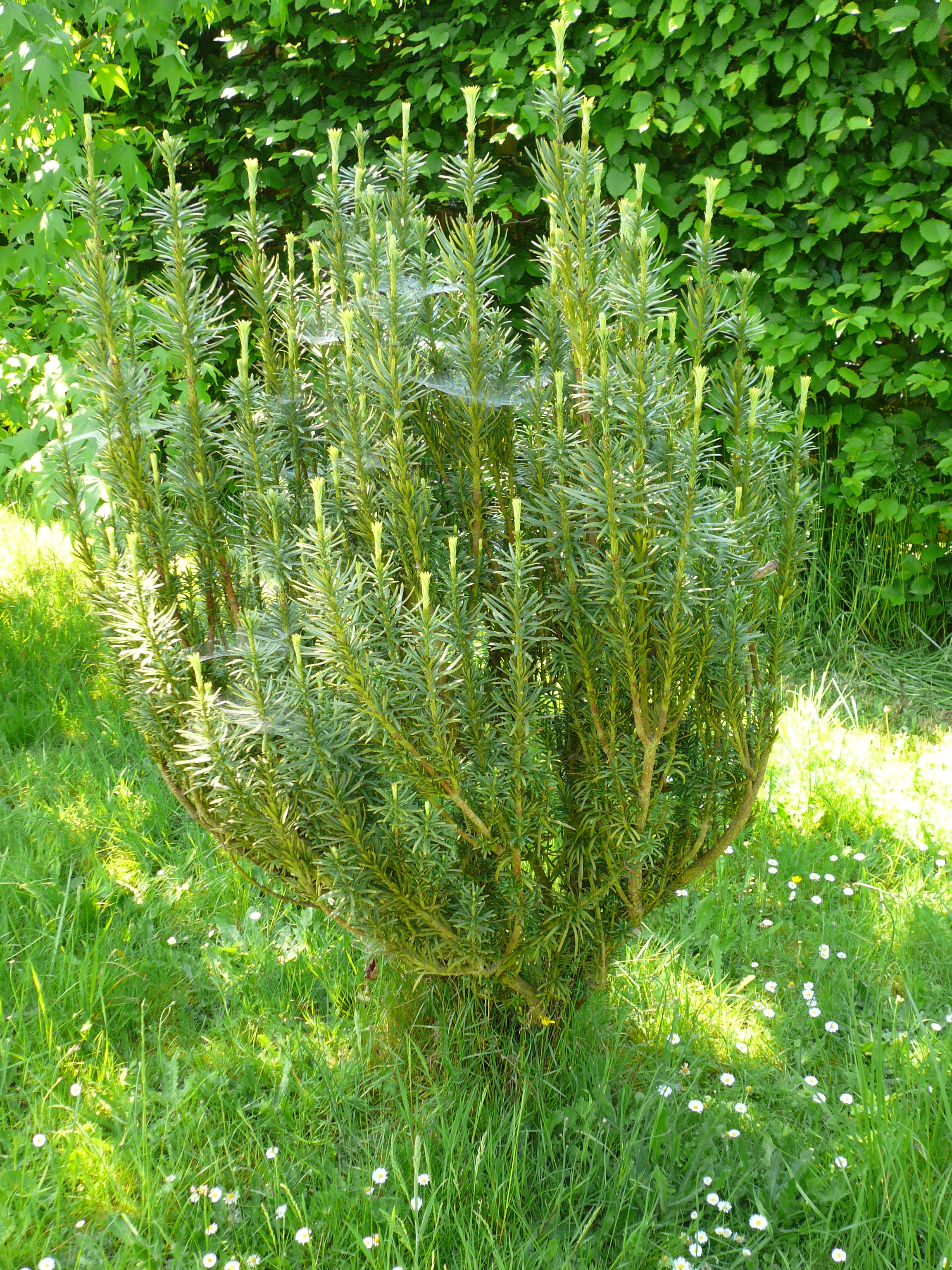 Cephalotaxus harringtonii 'Fastigiata' dans mon jardin